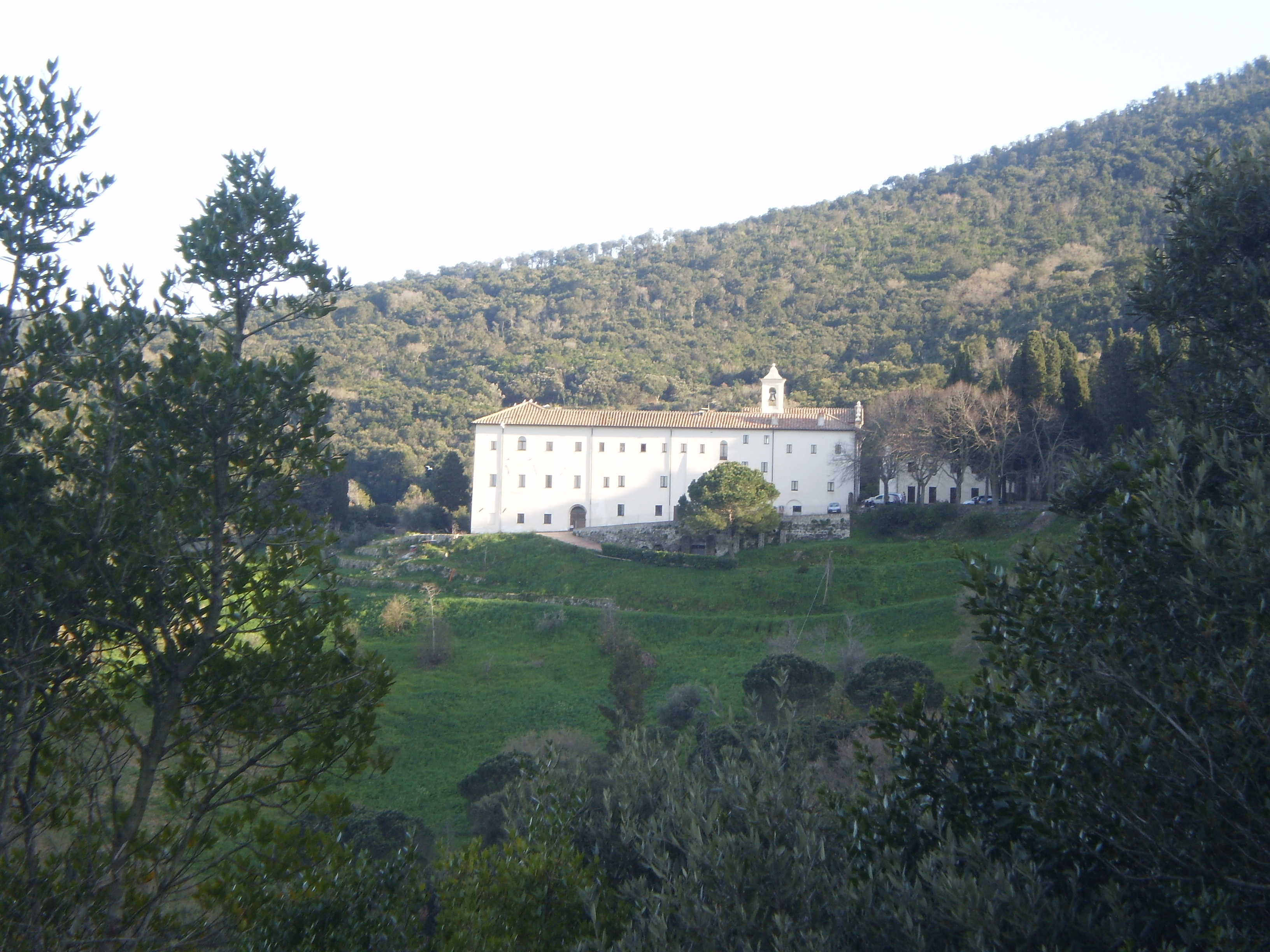 Convento Padri Passionisti sul Monte Argentario. Oasi di pace.